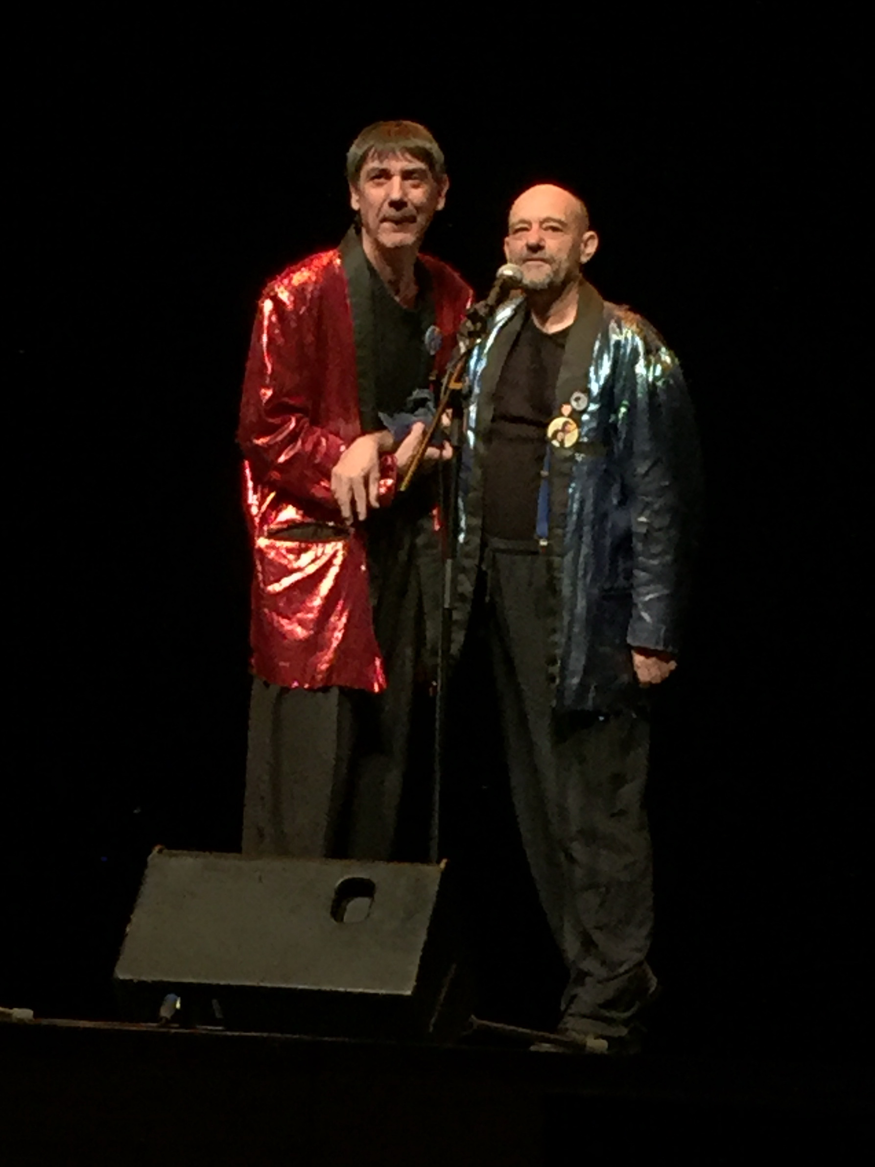 Faemino y Cansado a l'Atlàntida de Vic, any 2017